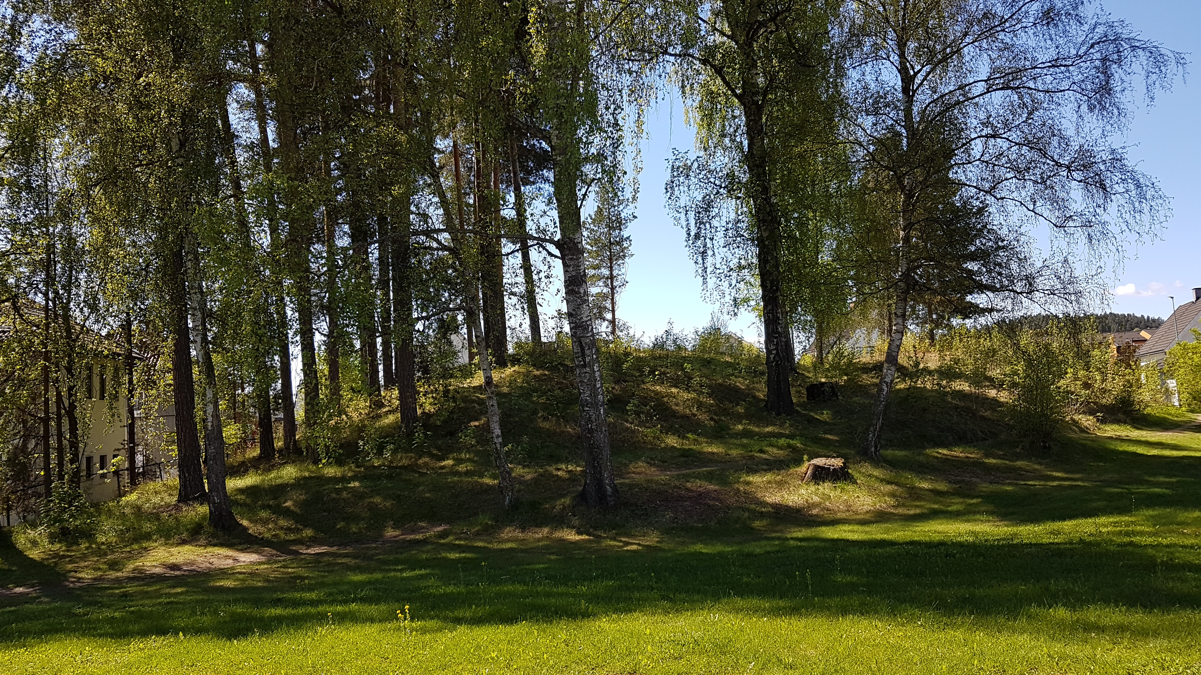 Schjongshaugen kalles også Buskhaugen og ligger på Schjong (Løkka) i Hønefoss, langs Dronningensgate mot Schjongslunden og stadionområdet (AKA Arena med mer)